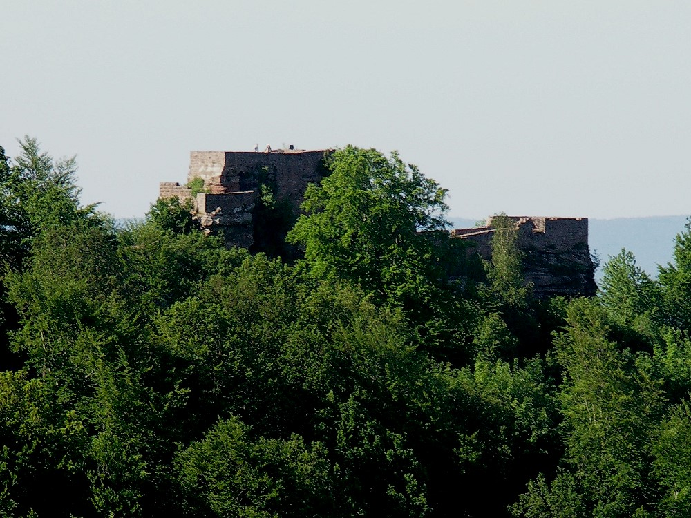 Wegelnburg, aufgenommen von der Hohenburg aus. Datum: 26.5.2005 Fotograf: Peter Schmenger